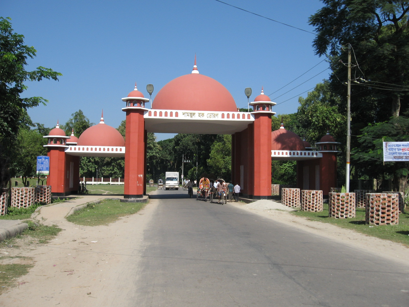 Samsul Haq toran in Tangail